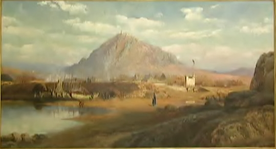 油画《胶州的早晨》——取景于汇泉湾畔，作者德国人